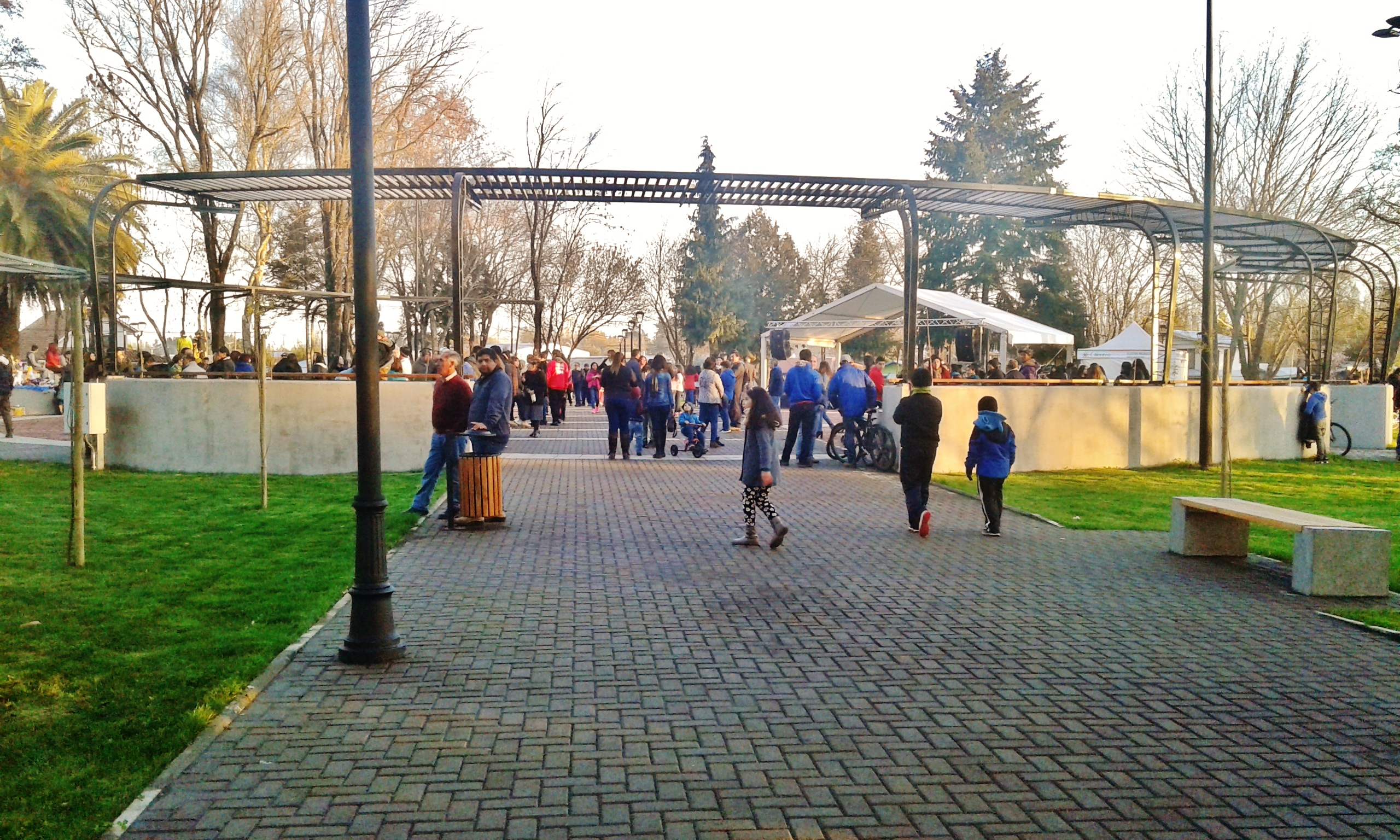 Plaza de Armas de Monte Águila, Chile